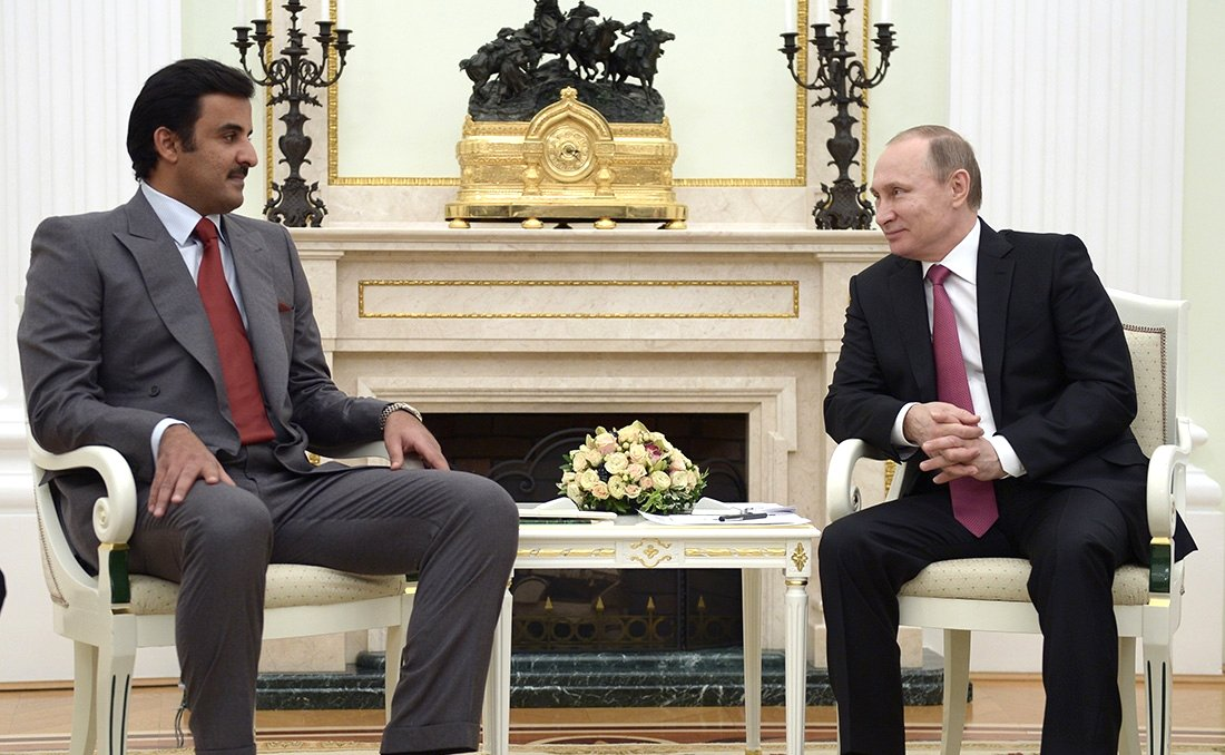 Встреча с Эмиром Катара Тамимом Бен Хамадом Аль Тани в Кремле.